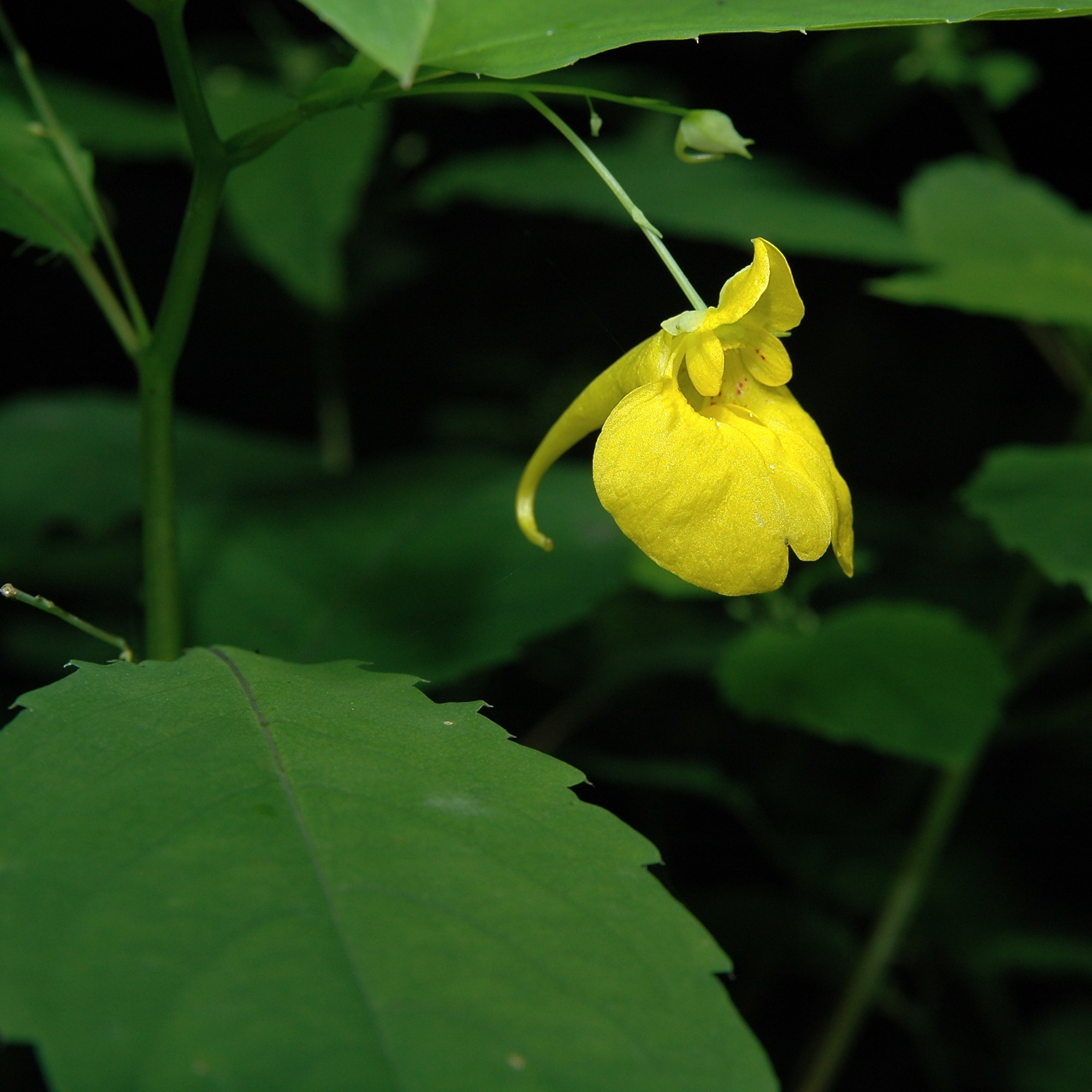 Impatiens noli-tangere in Västerås